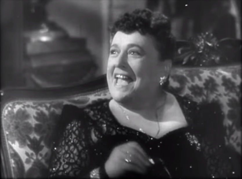 La actriz estadounidense Florence Bates en una imagen de la película Rebeca.